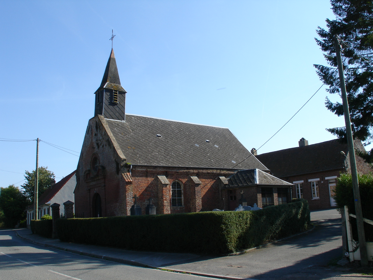 Église de La Loge